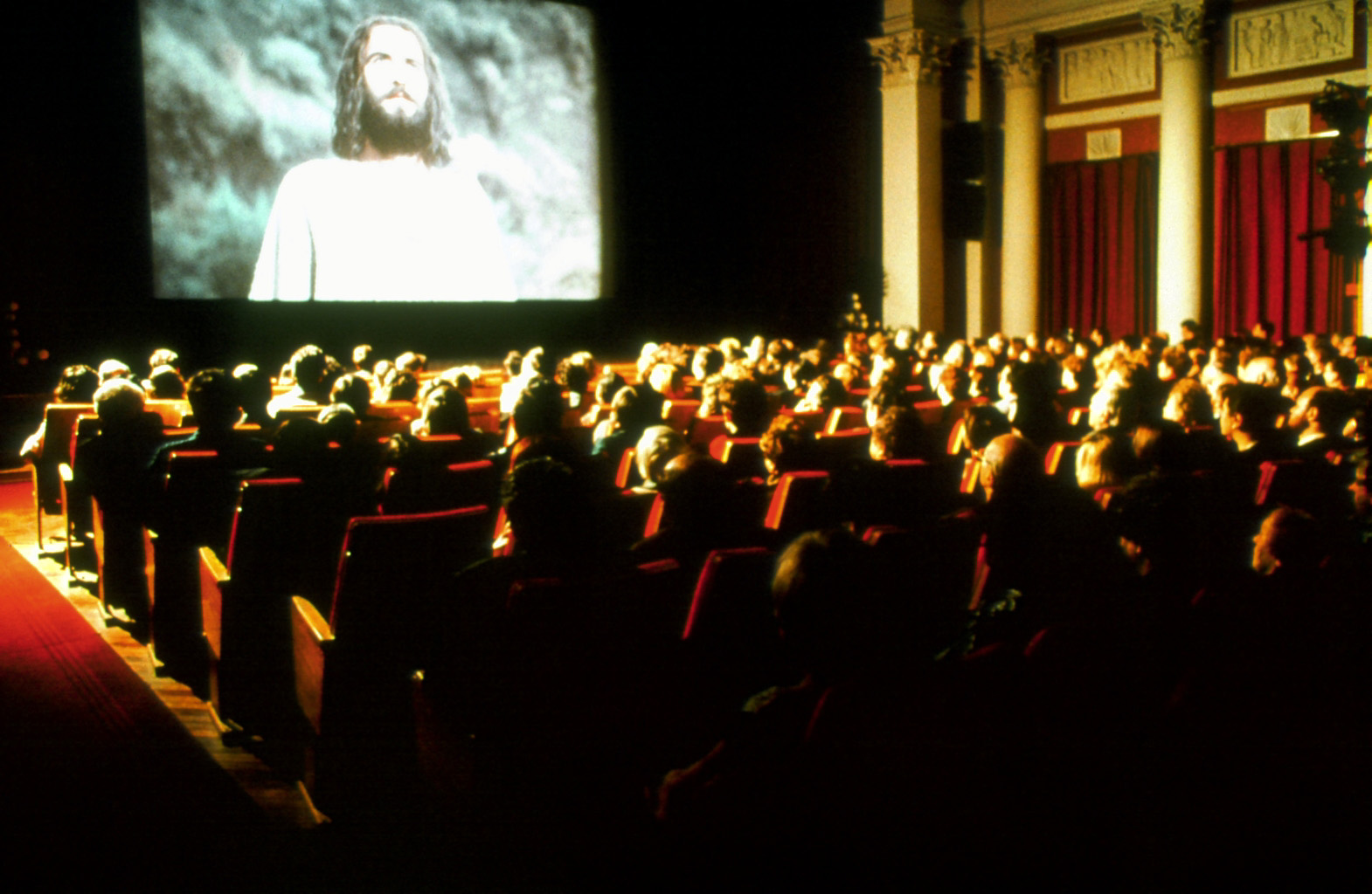 Vertoning van de film Jesus uit nl:1979. De foto is afkomstig van de website: [1] Een verzoek om de foto te gebruiken voor Wikipedia kreeg de volgende reactie: Yes, please feel free to use the photo. Please attribute it to The JESUS Film Project. Thanks, Karen Dye